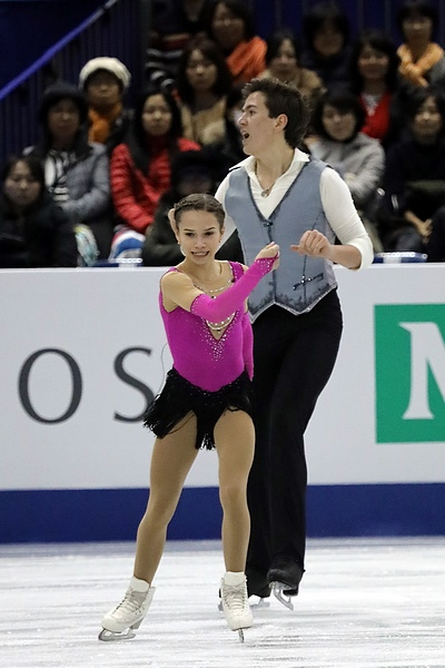 Дарья Павлюченко / Денис Ходыкин (Россия) на финале юниорского Гран-при 2017-2018